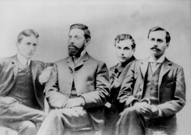 De izquierda a derecha: los escritores chilenos Carlos Pezoa Véliz (1879-1908), Samuel Lillo (1870-1958), Augusto d'Halmar (1882-1950) y el colombiano Isaías Gamboa (1872 – 1904).